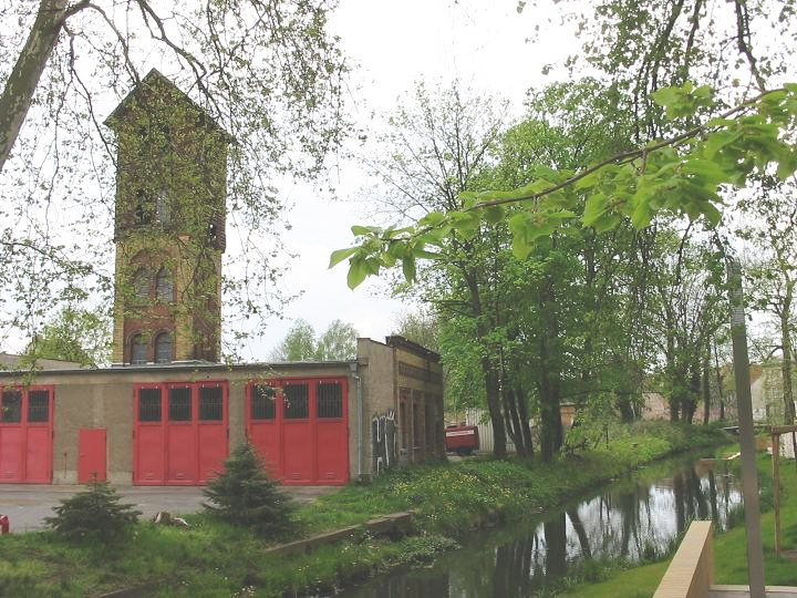 Nuthe_Feuerwehr_Luckenwalde, Brandenburg